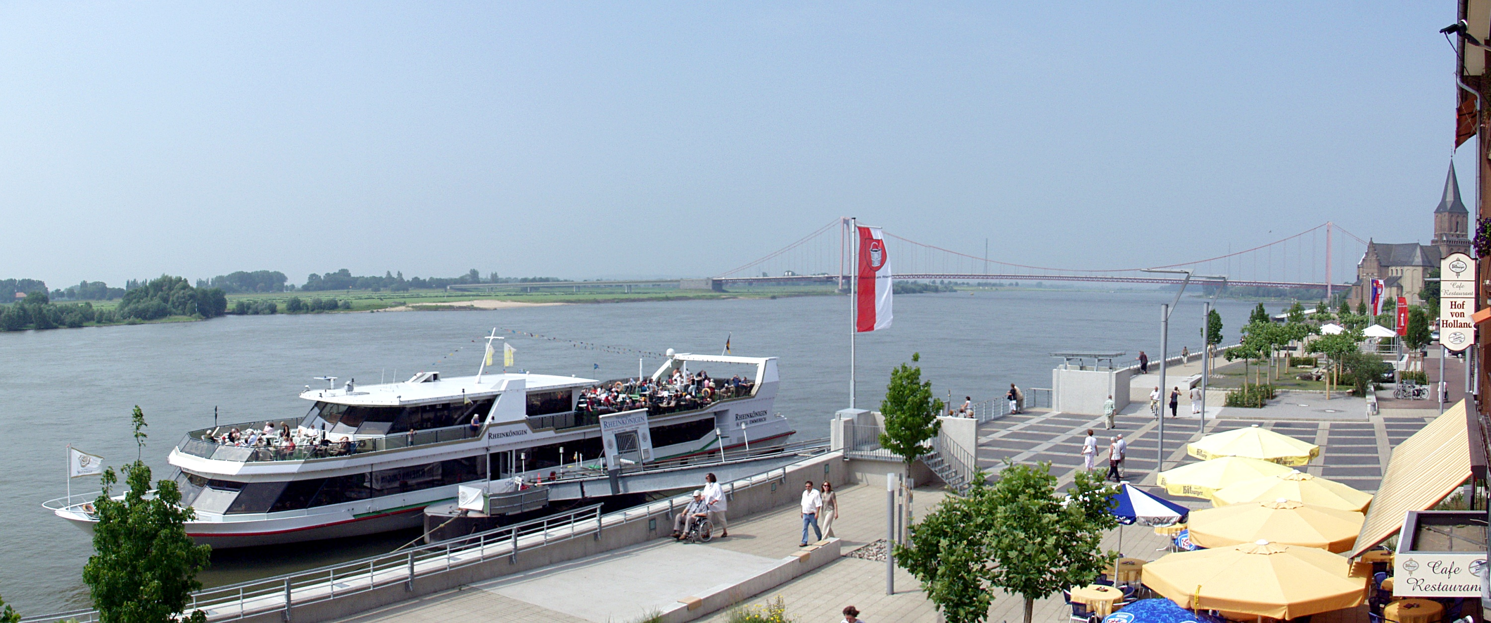 Emmerich am Rhein: Die neu gestaltete Rheinpromenade (eröffnet 2007), Blickrichtung Südwesten mit dem Fahrgastschiff „Rheinkönigin“.